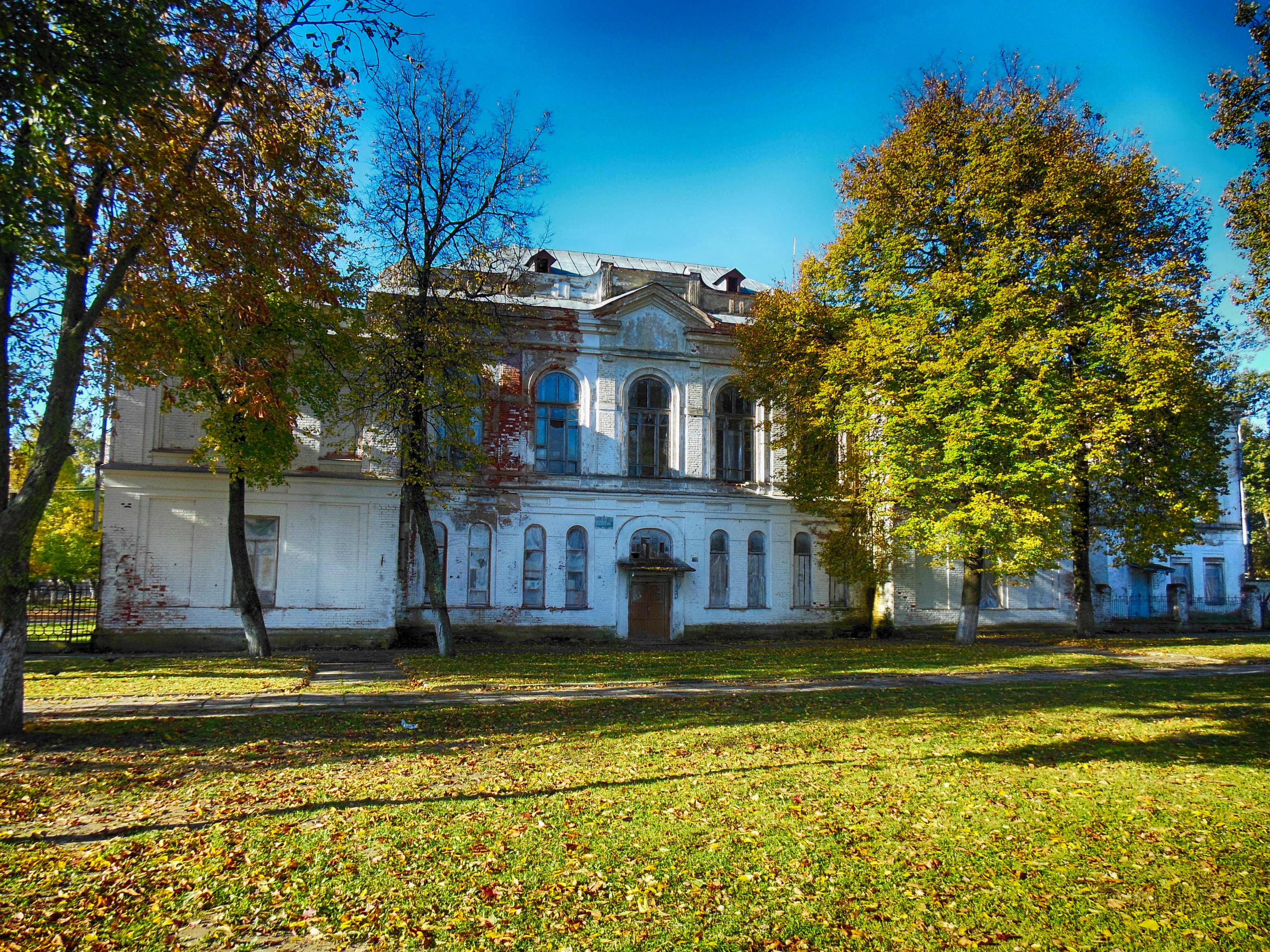 Беларуская (тарашкевіца): Мсьціслаў, мужчынская гімназія